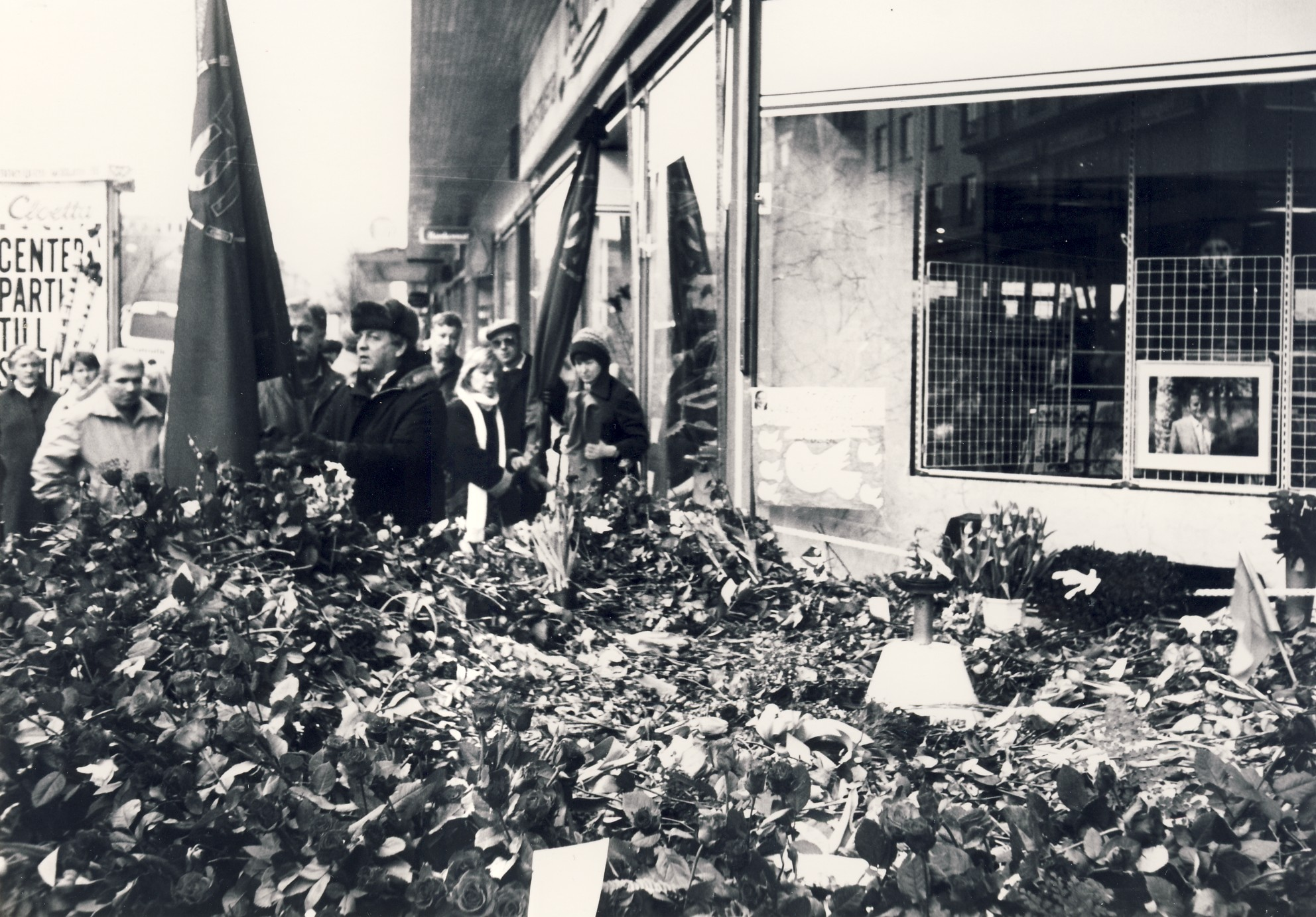 Stockholmare lägger blommor på platsen där statsminister Olof Palme mördades den 28 februari 1986